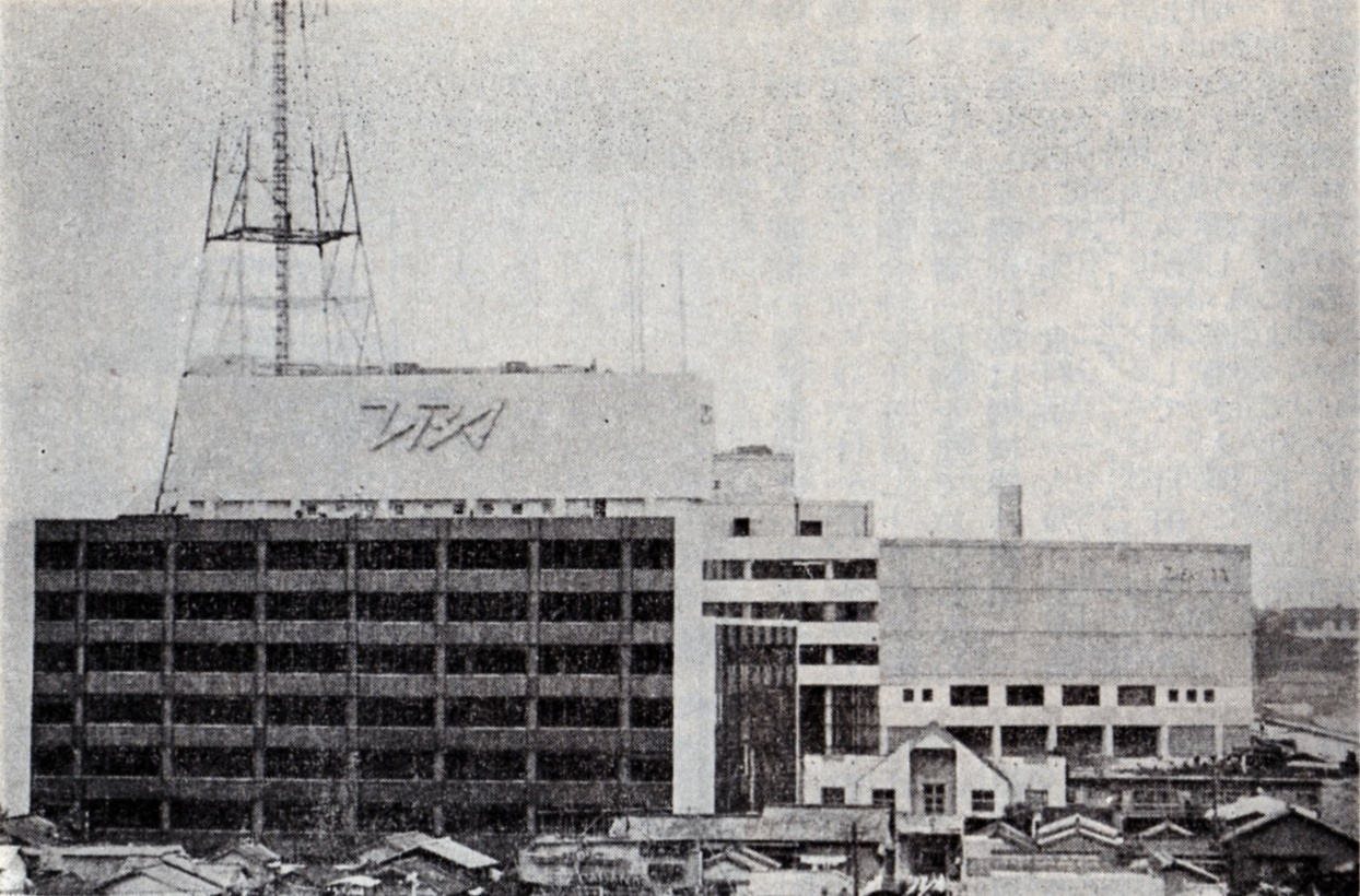 東京放送（TBSテレビ・TBSラジオ）の1961年当時の本社屋（赤坂メディアビル）